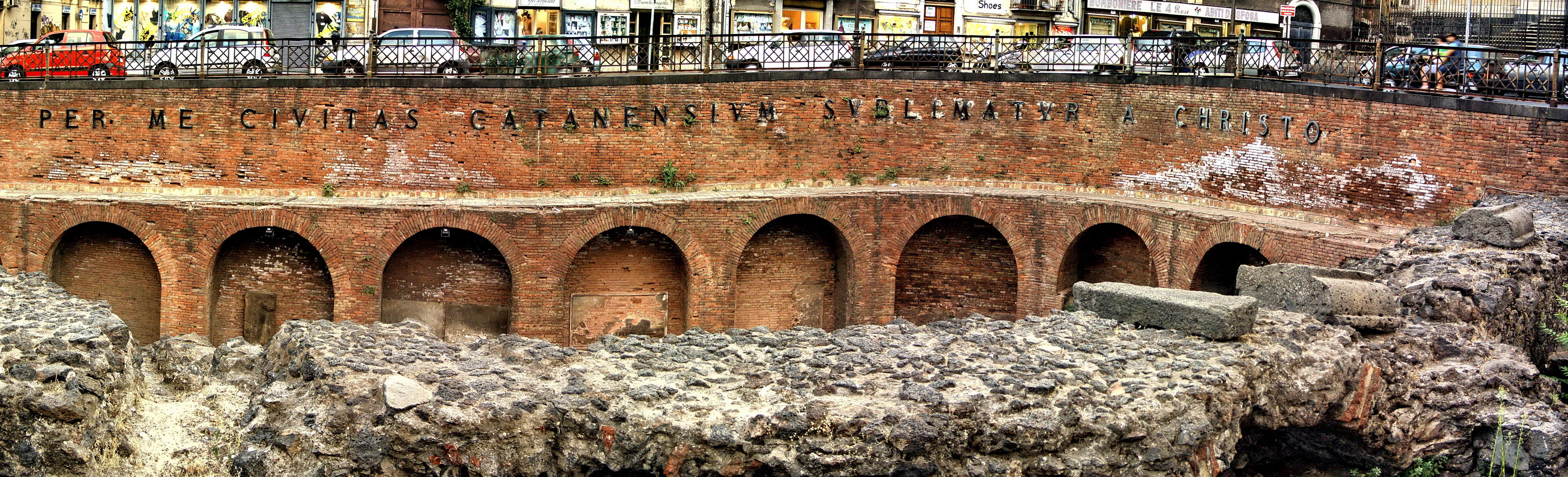 Vista panoramica della scritta all'interno dell'anfiteatro. Zoomabile.